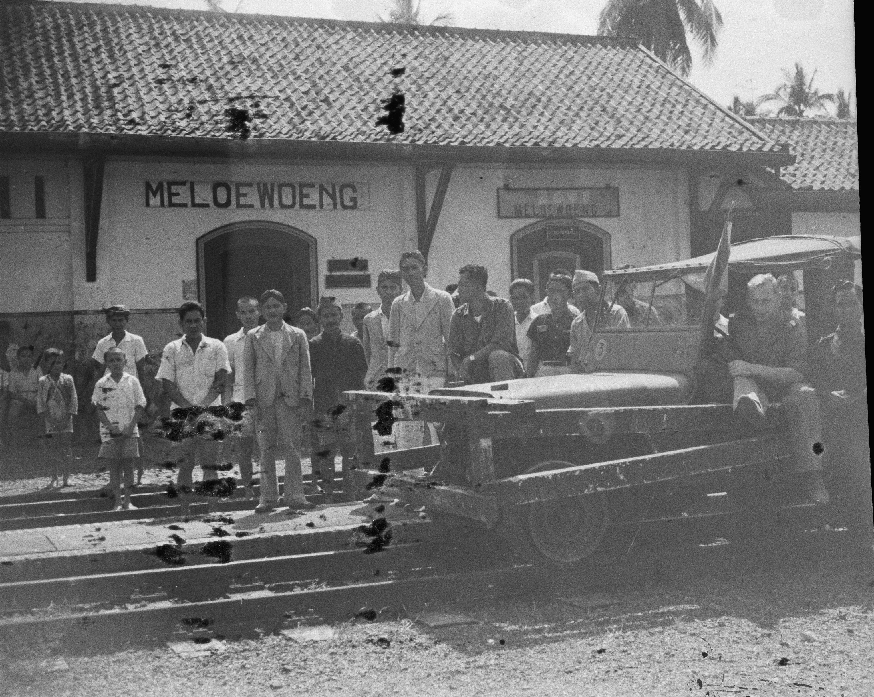 Collectie / Archief : Fotocollectie Dienst voor Legercontacten Indonesië Reportage / Serie : [DLC] Banjoemas, Chinese controle-commissie. Haven Tjilatjap. Waranedja Beschrijving : Jeep die geschikt is gemaakt om op spoorrails te rijden trekt veel belangstelling op het spoorwegstation van Meloewoeng Annotatie : Het station ligt aan de spoorlijn Padalarang-Kasugihan bij Wanareja (Cilacap) Datum : 10 oktober 1947 Locatie : Indonesië, Meluwung, Nederlands-Indië Fotograaf : Taillie, J.C. / DLC Auteursrechthebbende : Nationaal Archief Materiaalsoort : Negatief (zwart/wit) Nummer archiefinventaris : bekijk toegang 2.24.04.03 Bestanddeelnummer : 386-5-4